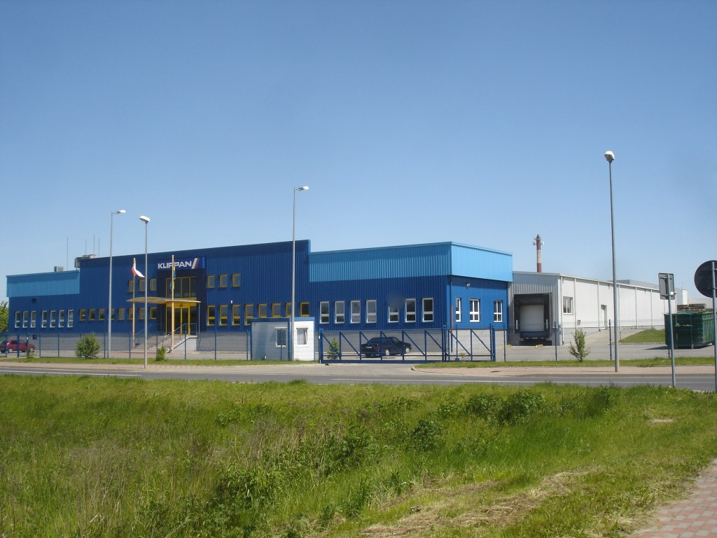 Fabryka Klippan Safety Sp. z o.o. w Stargardzie, ul. Nasienna 17 (Stargardzki Park Przemysłowy)